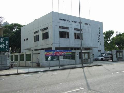 上水區鄉事委員會